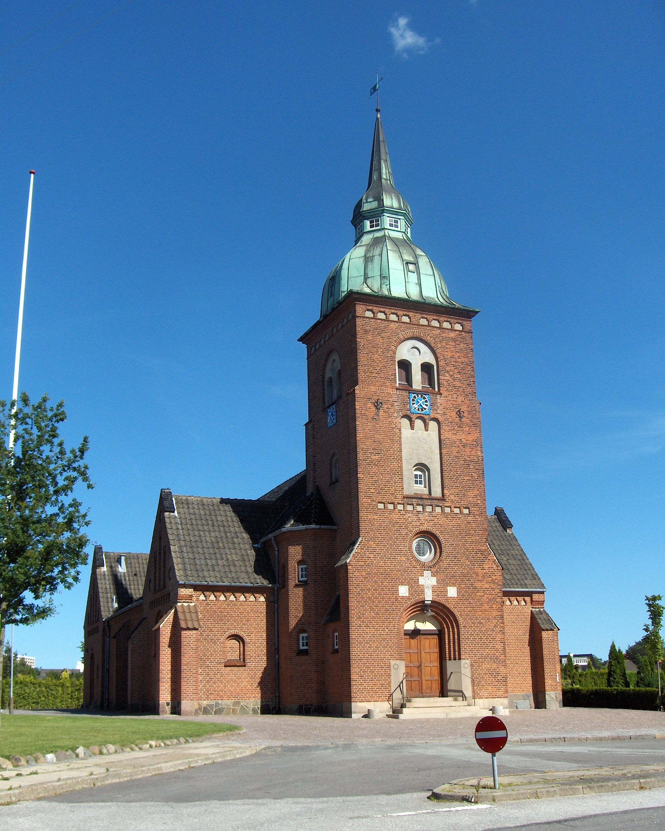 Vejgaard Kirke i Aalborg